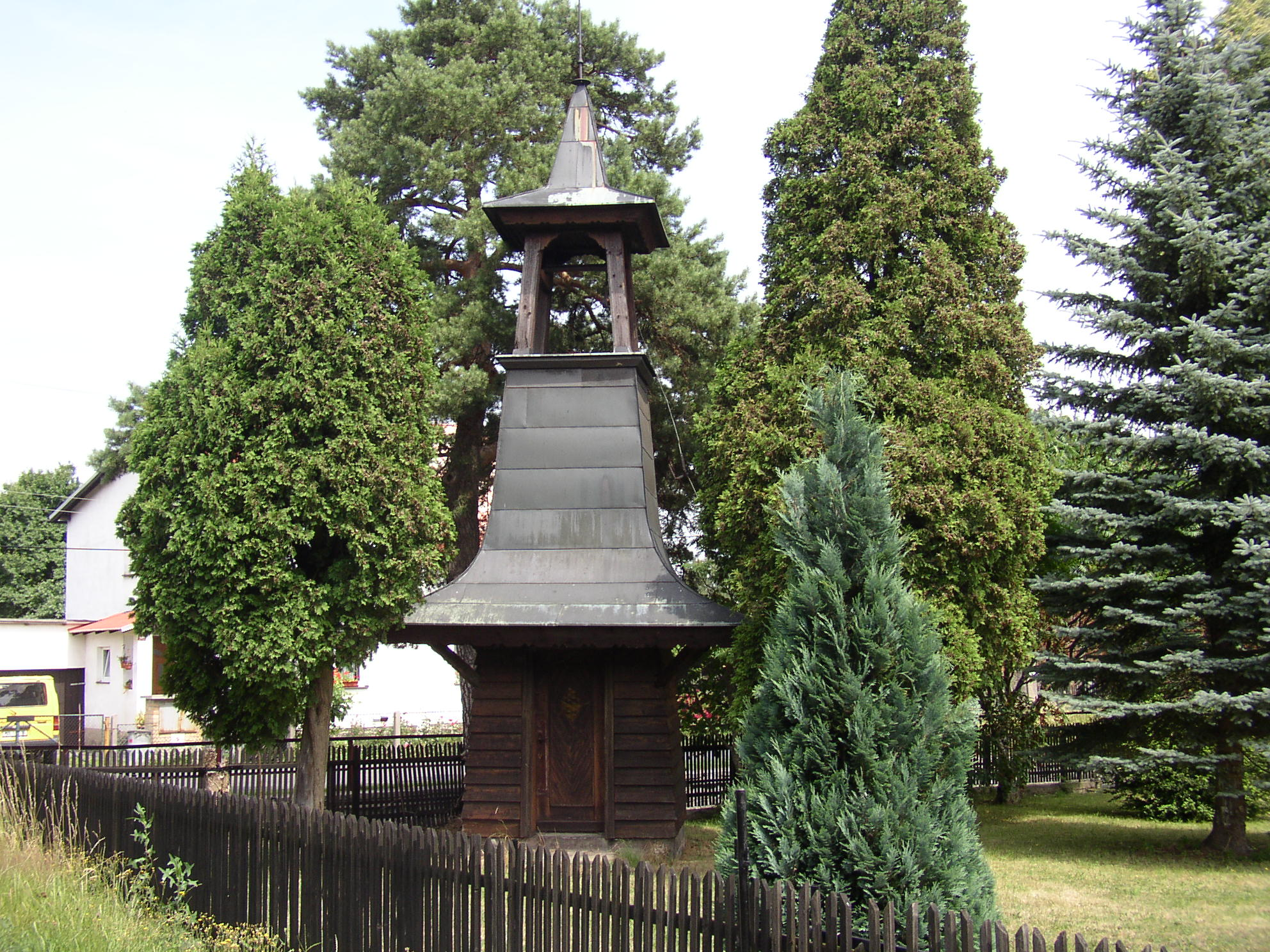 Dřevěná zvonička ve východní části obce Dolní Podluží